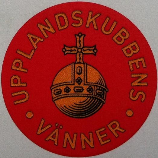 Upplandskubbens Vänner - föreningsmärke